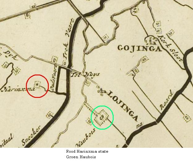 Uitsnede van de kaart van Schotanus uit 1720.